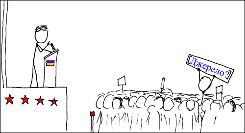 Джерело: Малюнок, що зображує спосіб мислення вікіпедистів